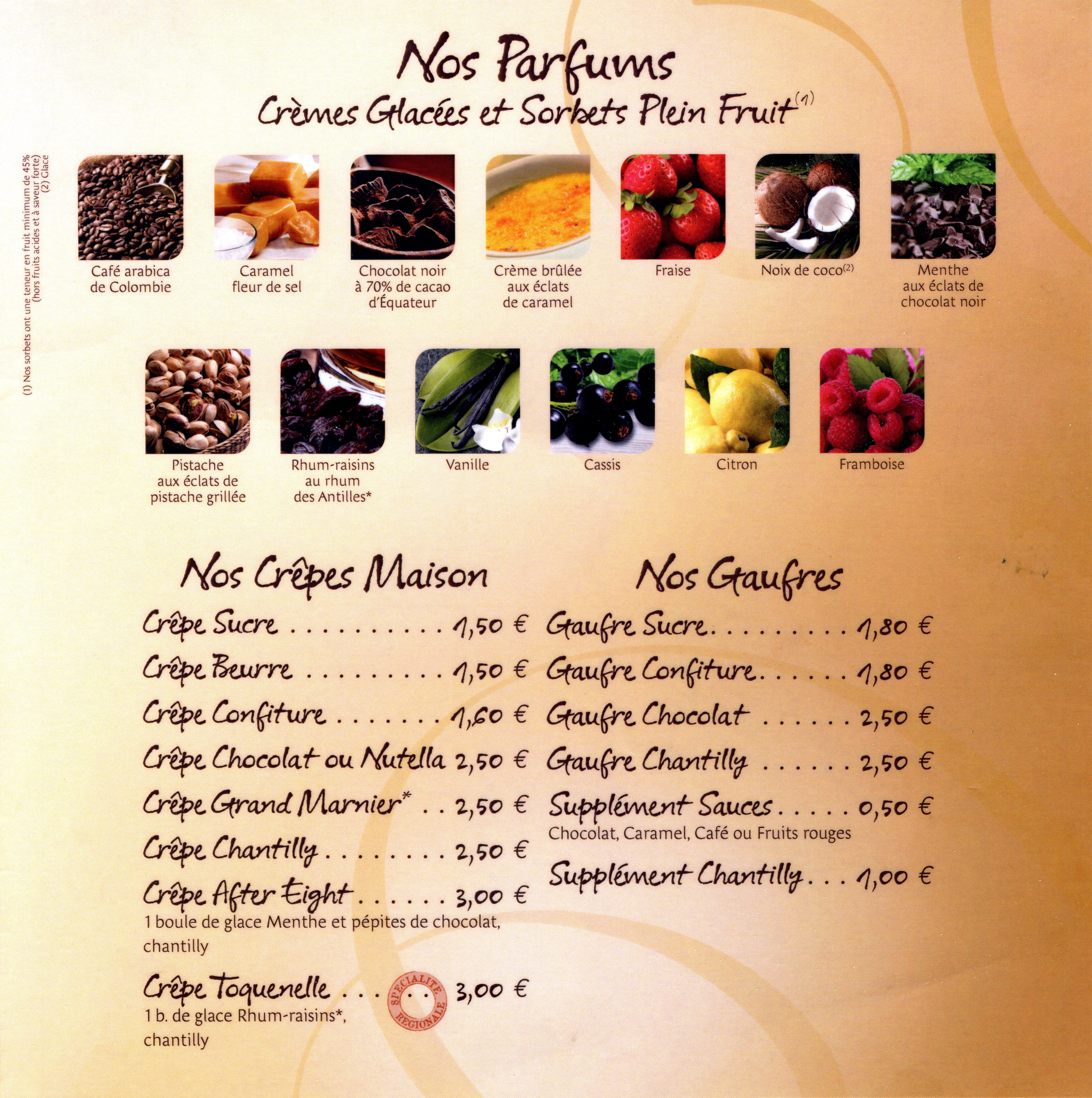 La carte des desserts 2012 du "salon de thé" du réseau de cafétérias Toquenelle. Cette carte est identique pour toutes les cafétérias du réseau. Ces cafétérias sont situées le plus souvent dans des centres commerciaux (hypermarchés). Toquenelle: entreprise de restauration de 11 cafétérias (en 2012) sous le forme juridique de société par actions simplifiée, filiale du Groupe Atlantique Coop (Saintes, Charente Maritime, France).